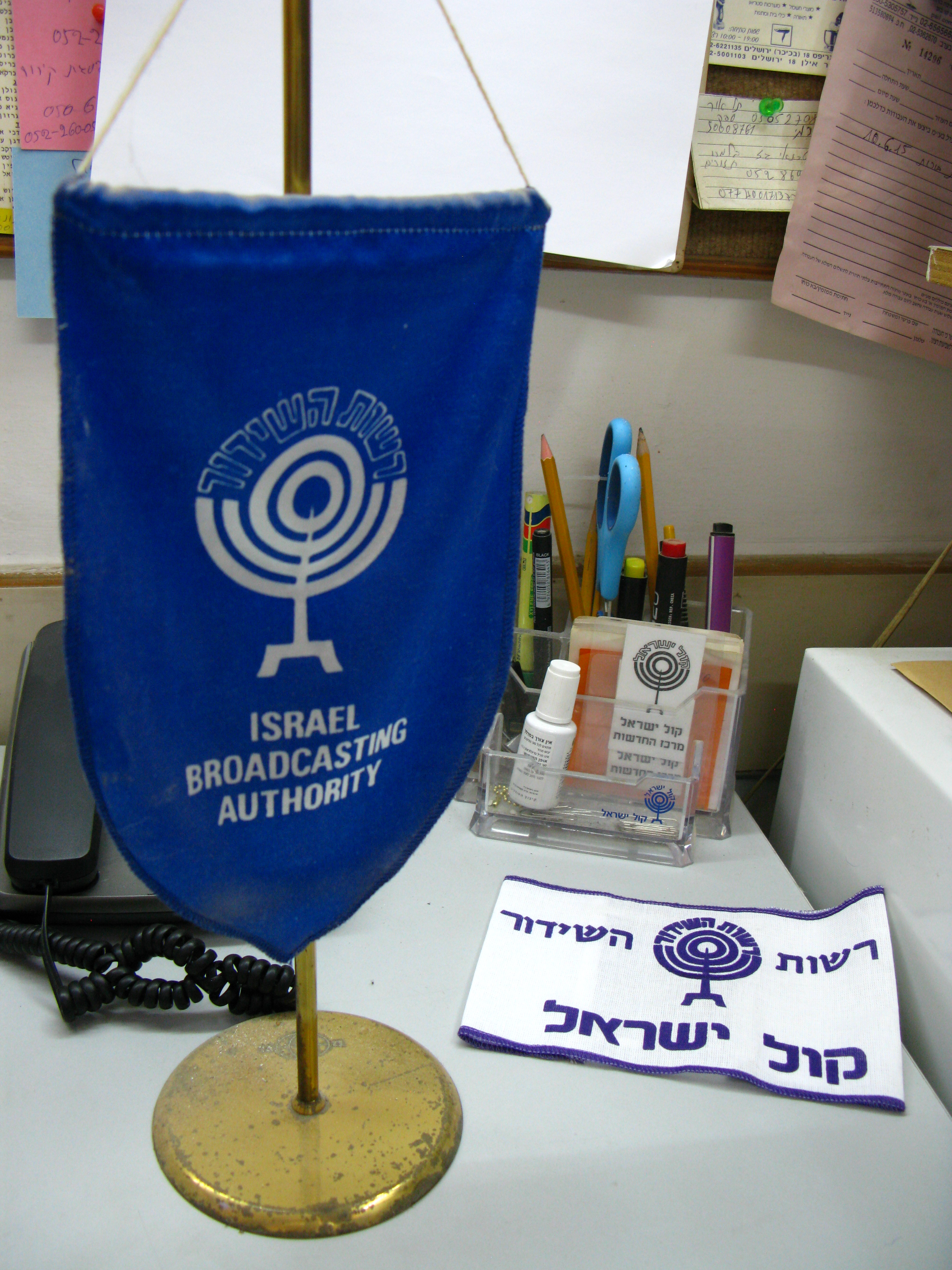 בניין קול ישראל ברחוב הלני המלכה בירושלים, משמש את תחנת הרדיו "קול ישראל" מאז ימי הרדיו המנדטורי ב-1939, ולסגירת רשות השידור.